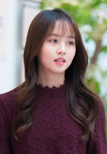 김소현 숲 팬싸인회